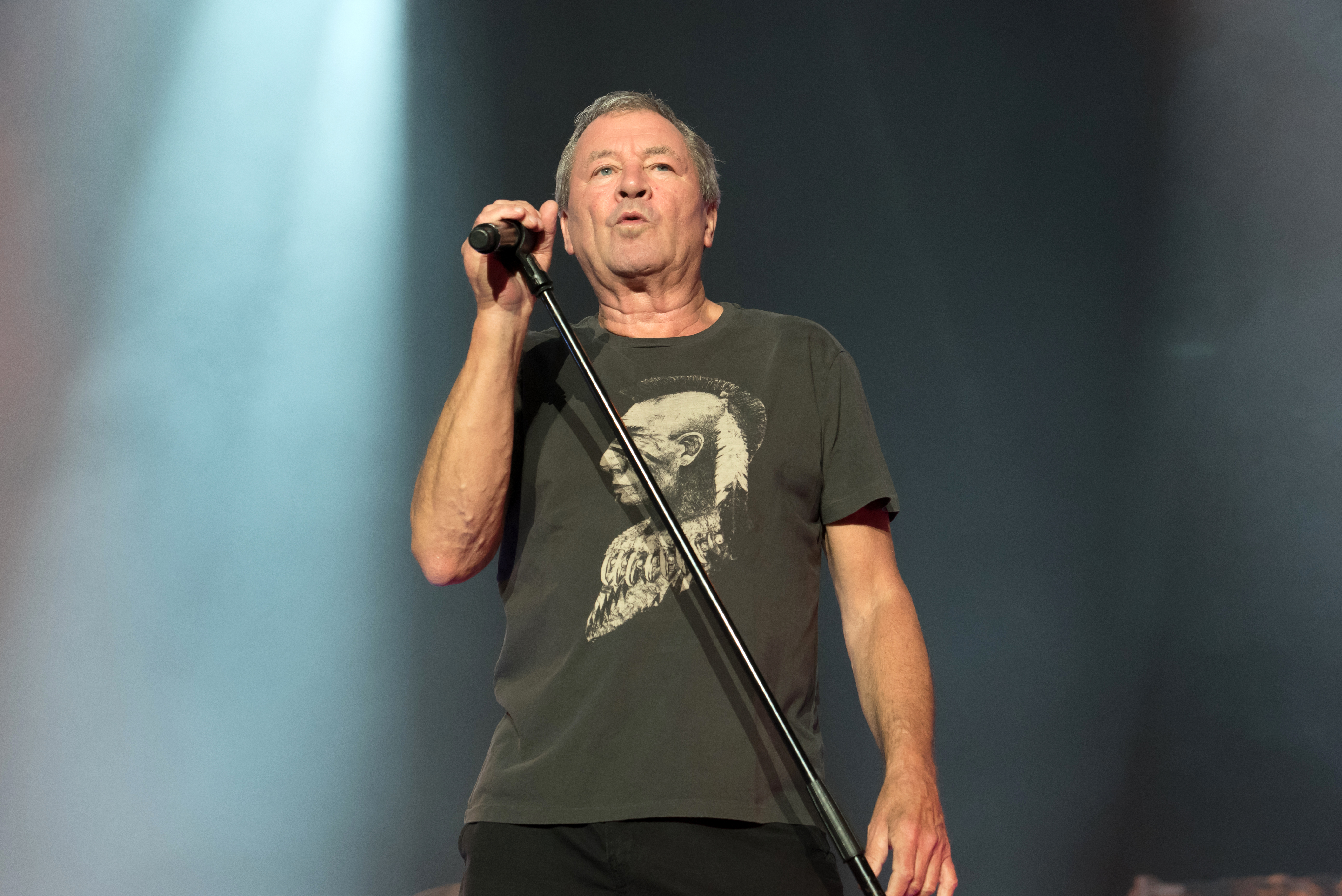 Ian Gllan von Deep Purple bei der inFinite "The Long Goodbye Tour" in der Barclaycard Arena in Hamburg 2017